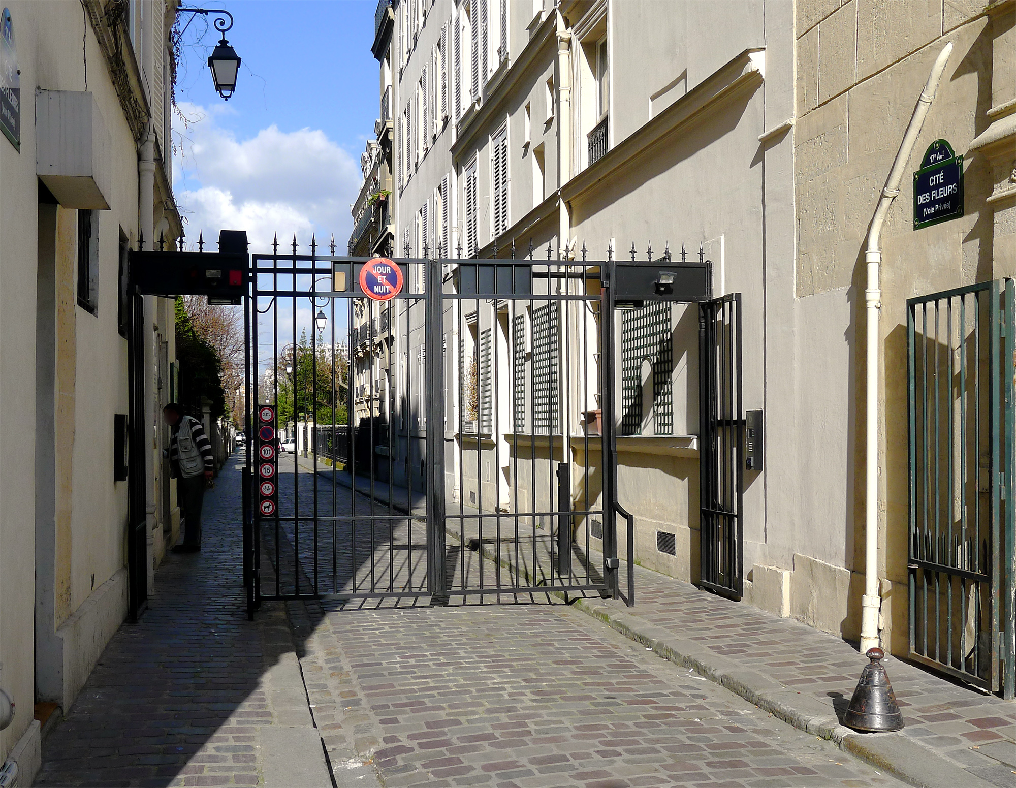 Cité des Fleurs - Paris XVII